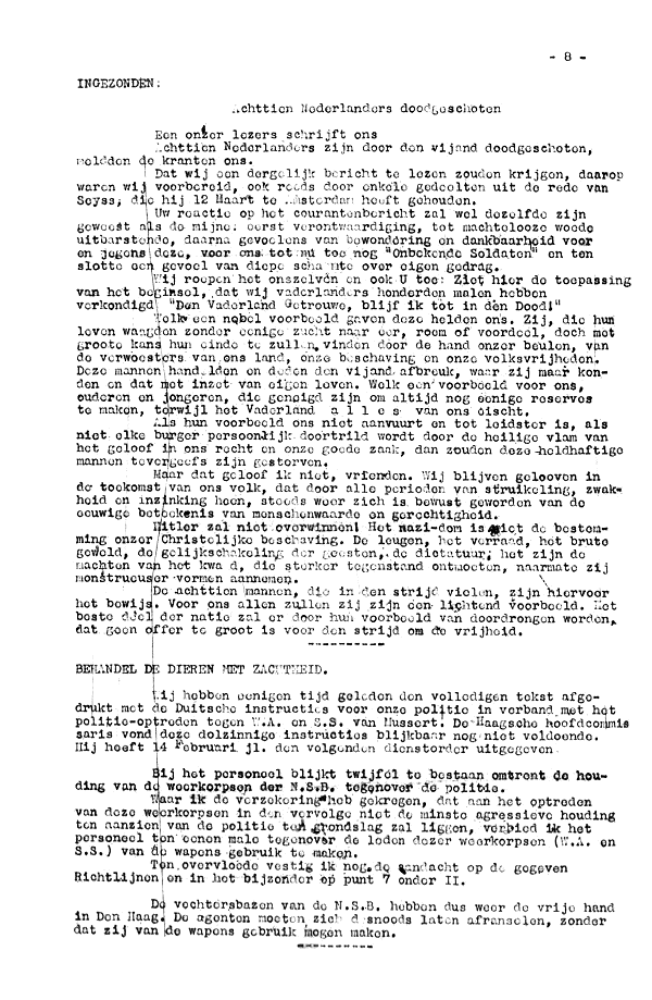 Het Parool; nr. 6; 9 april 1941; blz. 8; Ingezonden brief over de 18 doden.